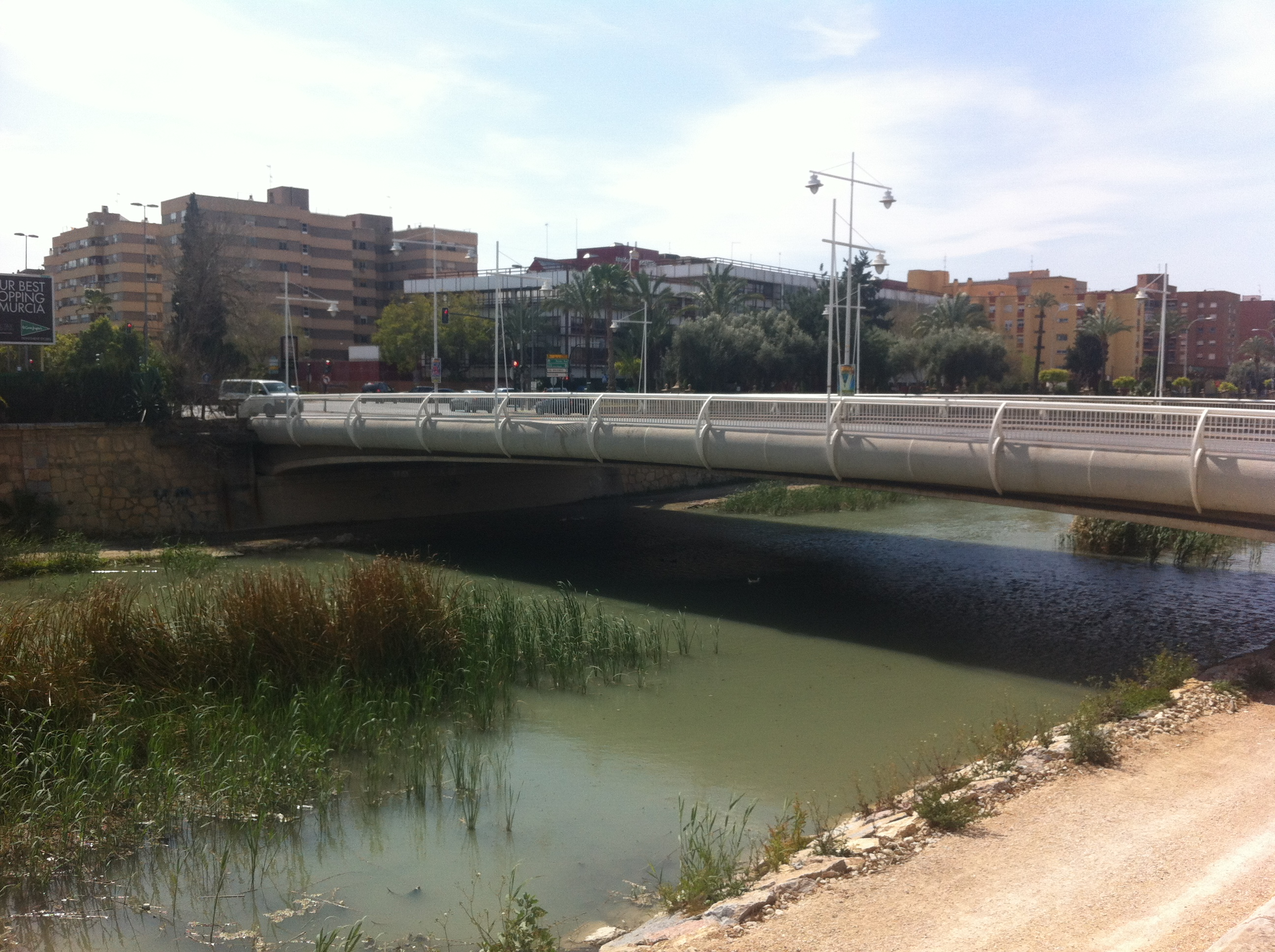 Puente de la Fica de Murcia (Region de Murcia, España) sobre el río Segura. Año 1969.